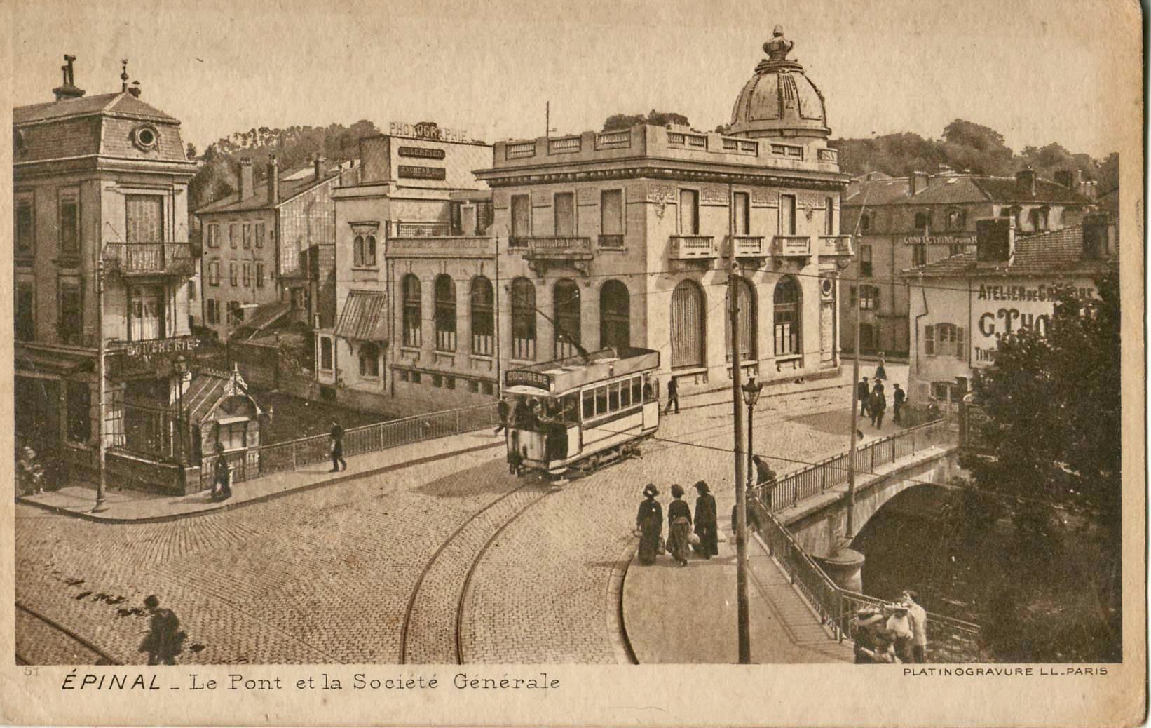 Carte postale ancienne éditée par Platinogravure LL Paris, n°51 : ÉPINAL - Le Pont et la Société Générale